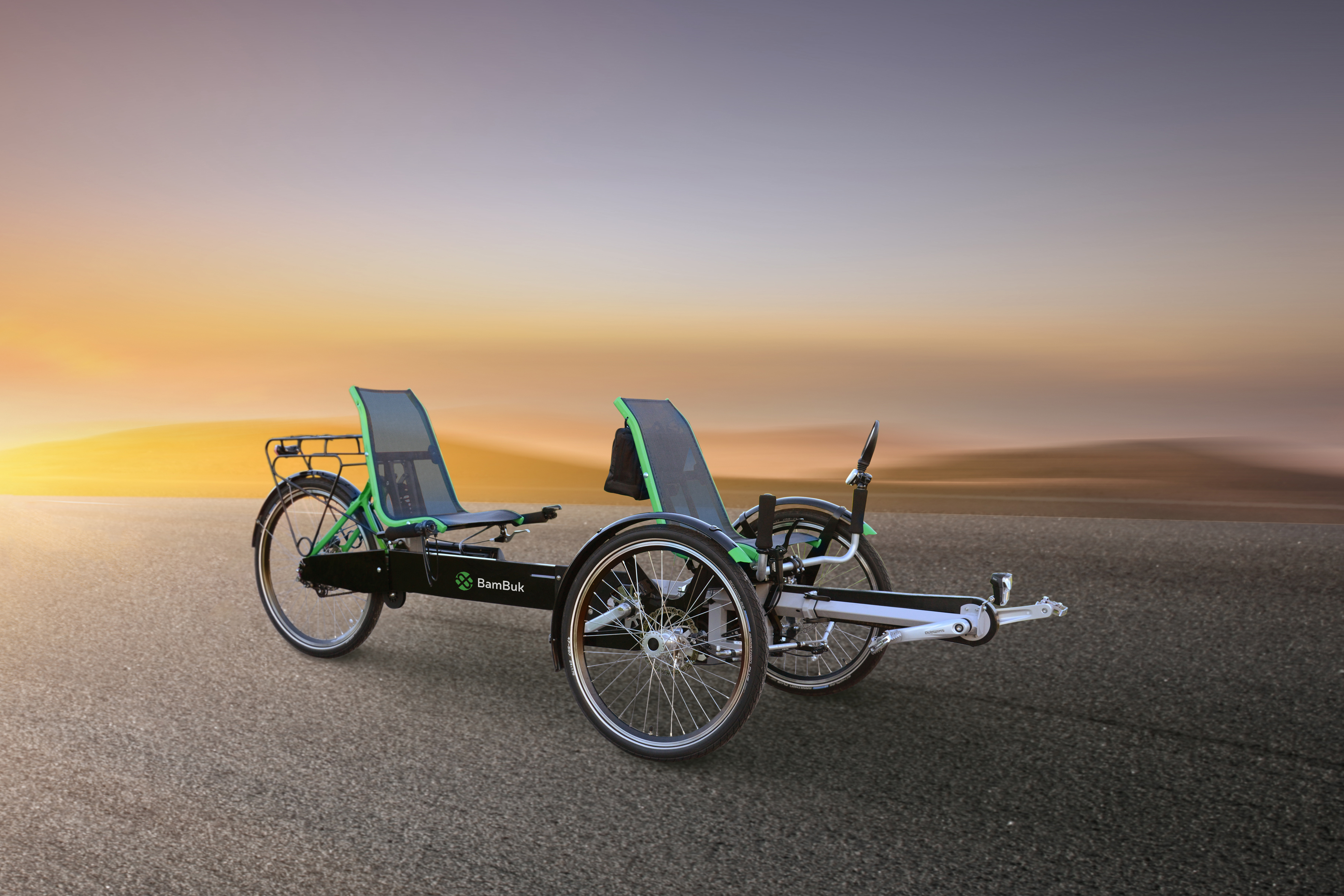 Велосипед БамБук на закате